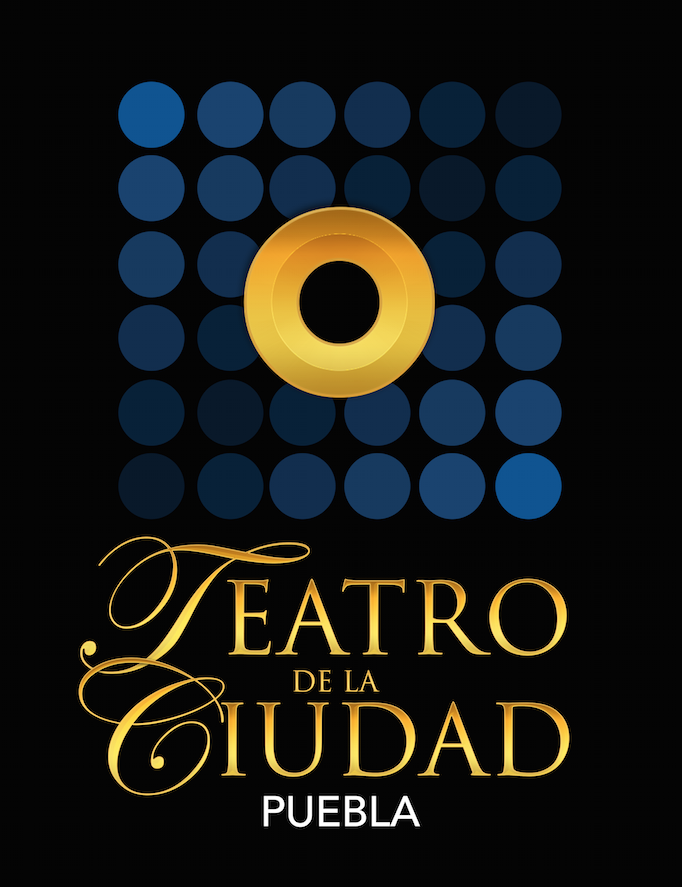 El logotipo del Teatro de la Ciudad.